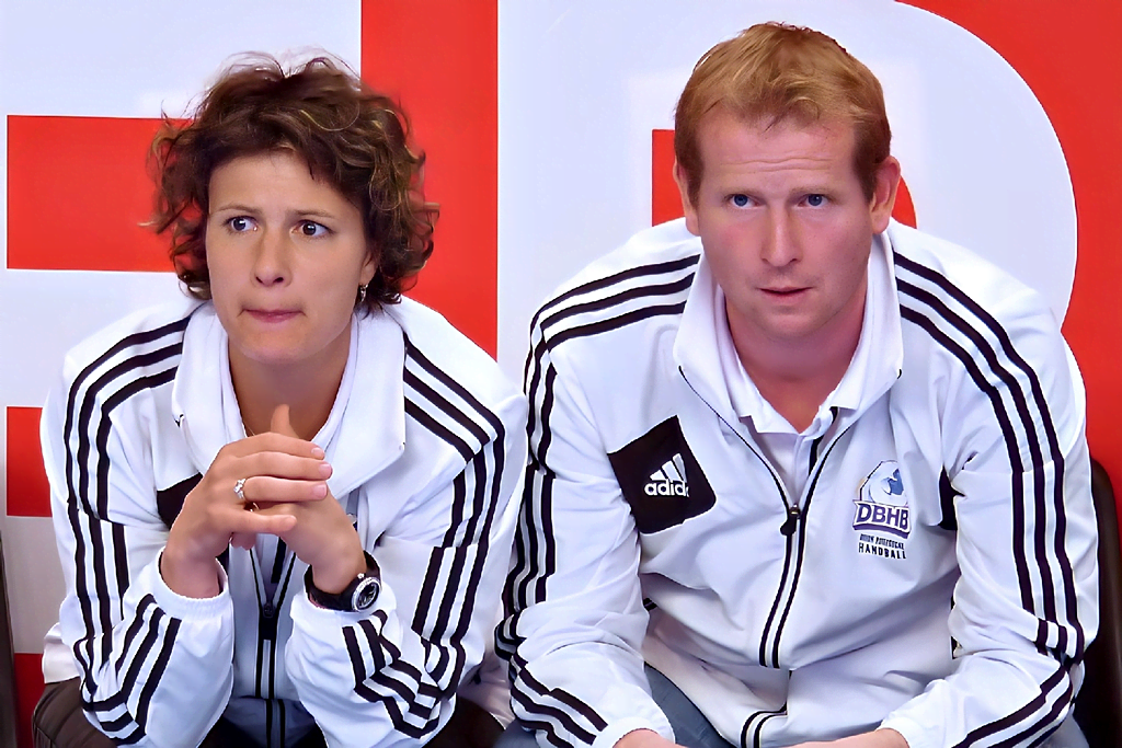 Ulrich Chaduteaud et Elena Groposila, entraîneurs du club masculin Dijon Bourgogne Handball, lors du match face au PSG Handball. Le 23 avril 2014.